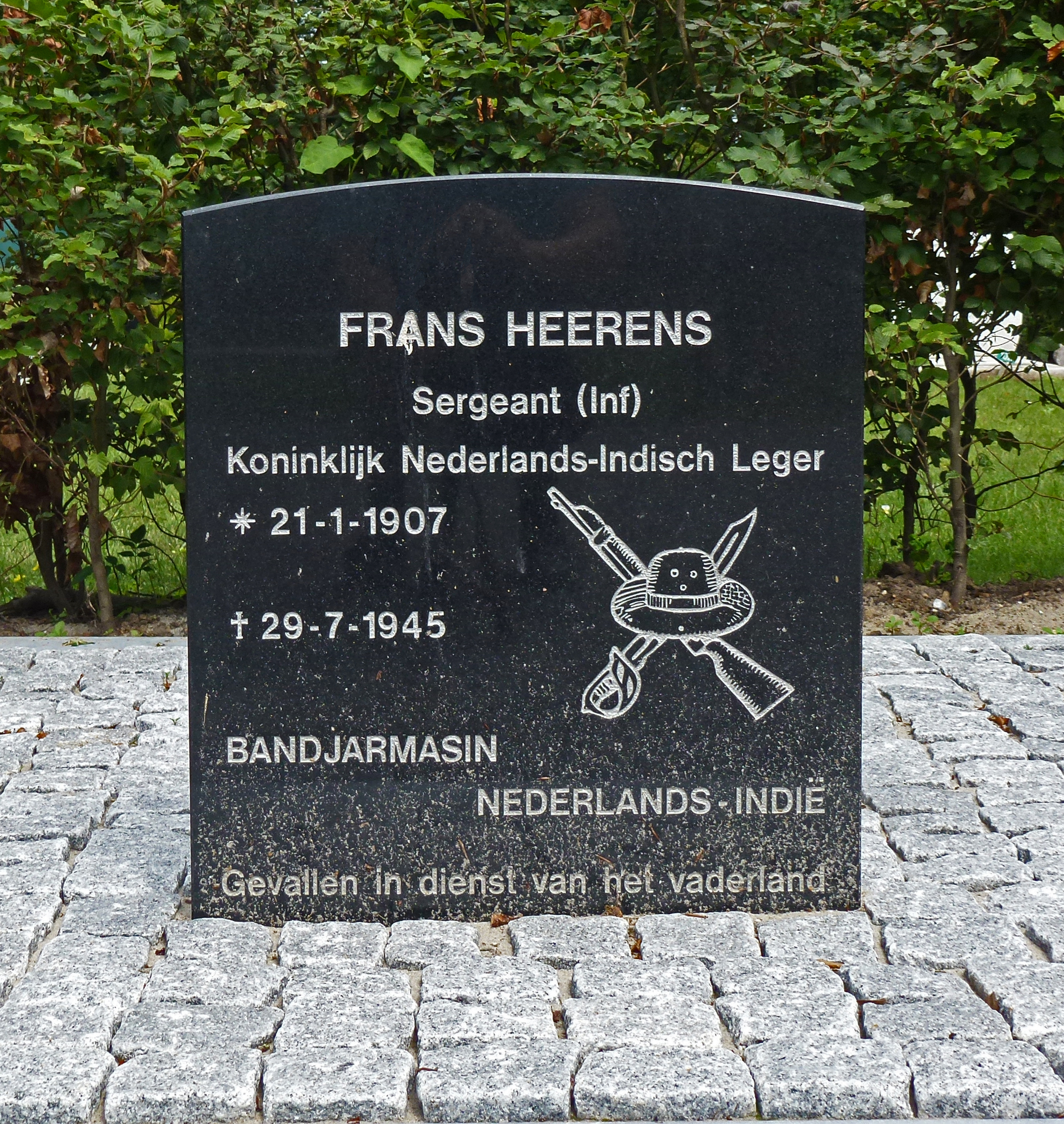 Oorlogsmonument op de Algemene Begraafplaats, Wal 5-7, 2871 BB, Schoonhoven. Tekst: Frans Heerens Sergeant (Inf) 21-1-1907 29-7-1945 Bandjarmasin, Nederlands Indie Gevallen in dienst van her Vaderland afbeelding: geweer, hoed en sabel